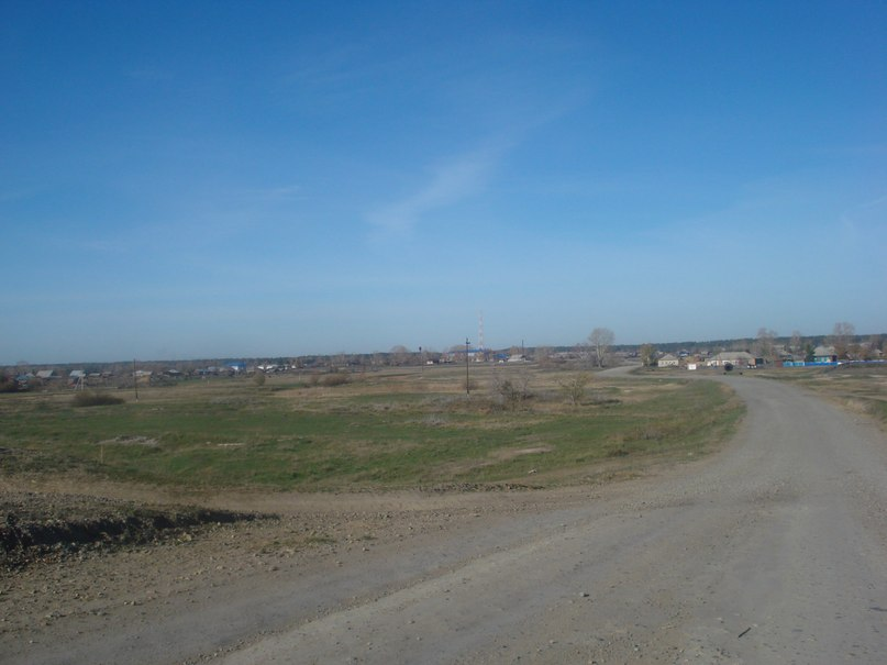 Въезд в с. Усть-Мосиха